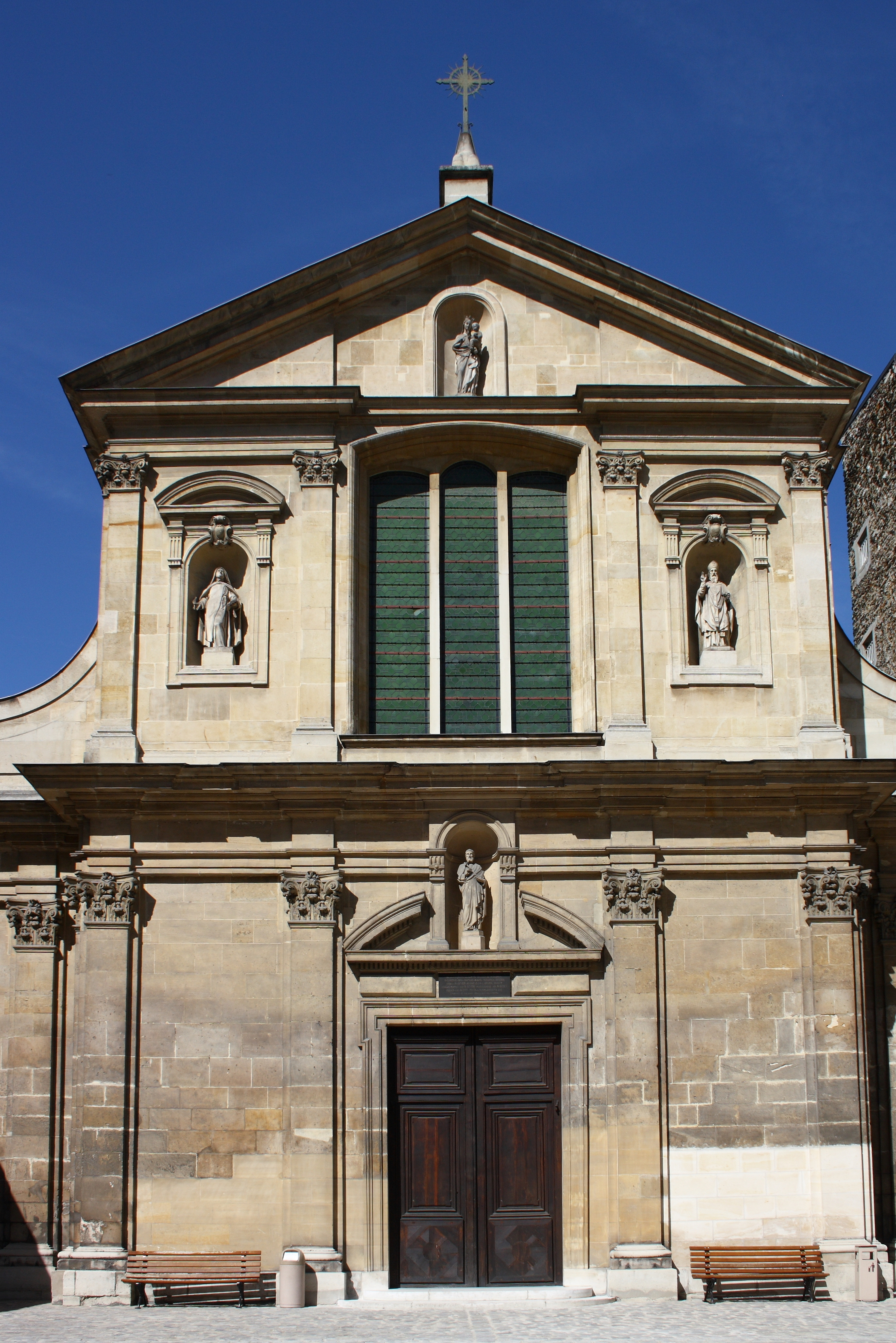 Katholische Kirche Saint-Joseph-des Carmes, ehemalige Kirche der Unbeschuhten Karmeliten, 70, rue de Vaugirard im 6. Arrondissement in Paris Object location48° 50′ 54.31″ N, 2° 19′ 45.8″ E